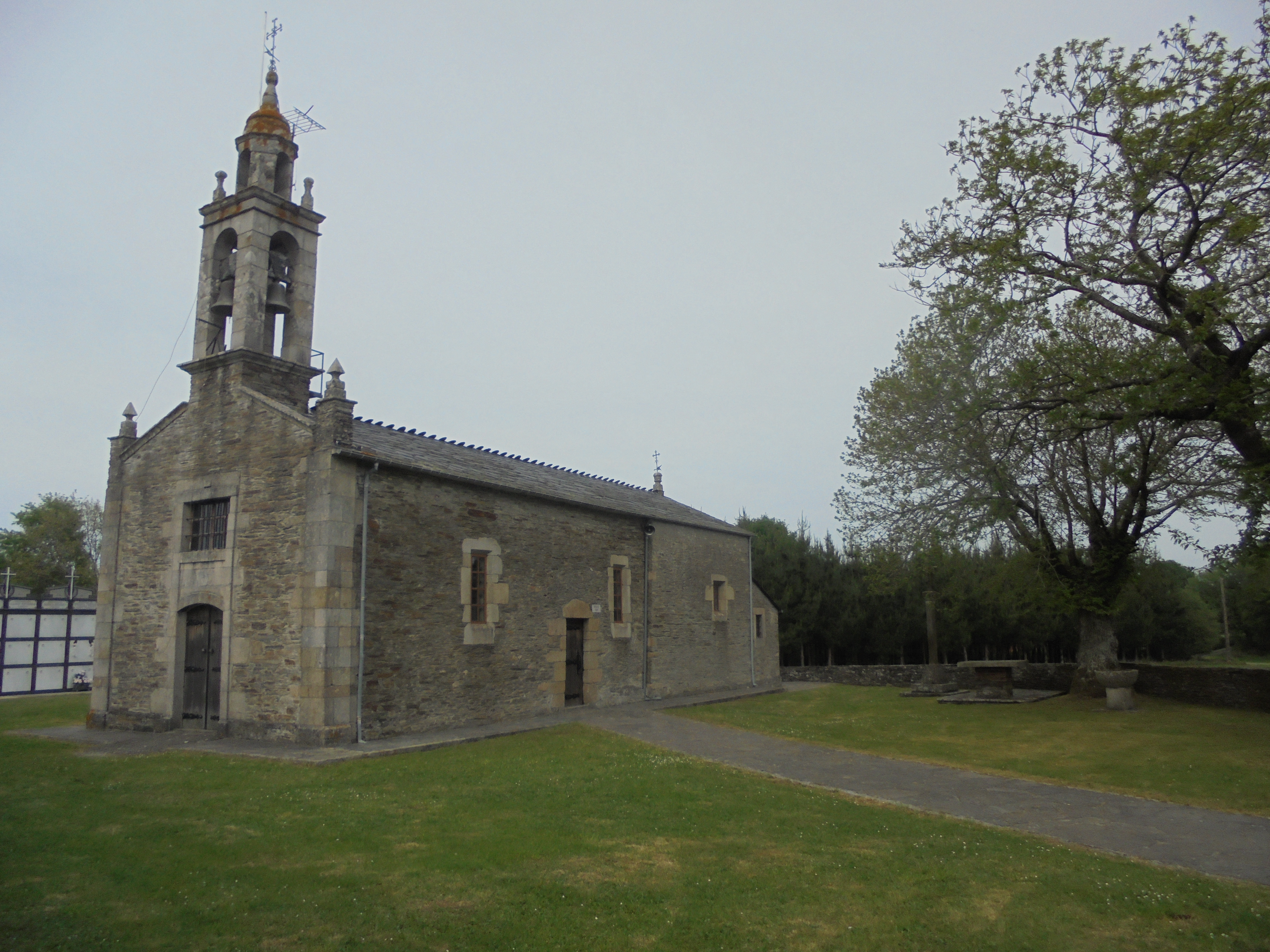 Igrexa parroquial de Vilela ( Outeiro de Rei)